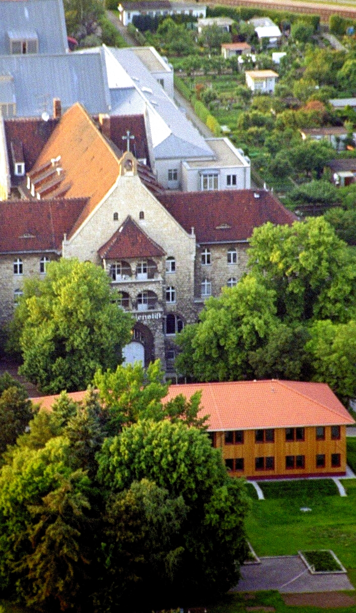 Klinik St. Marienstift Magdeburg aus der Luft